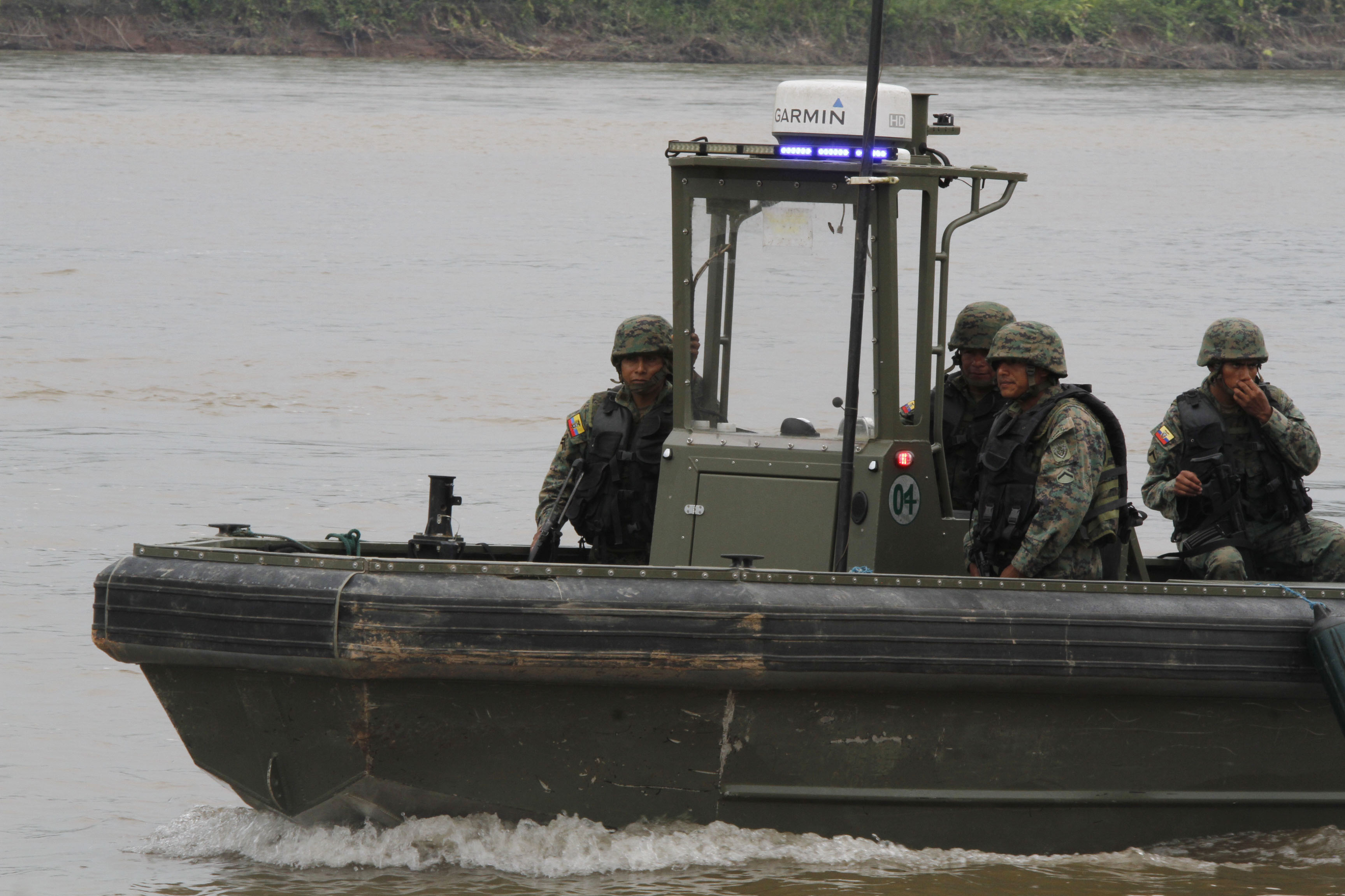 Puerto El Carmen 22 ago (Andes).-Fuerzas armadas ecuatorianas y colombianas realizan jornadas de patrullaje en el río Putumayo a orillas de Puerto El Carmen (Ecuador) y Puerto Ospina (Colombia), sector considerado como “el punto más caliente del cordón limítrofe” por la presencia de grupos armados irregulares colombianos y delincuencia, tráfico de combustibles, drogas y armas. Foto: Micaela Ayala V./Andes